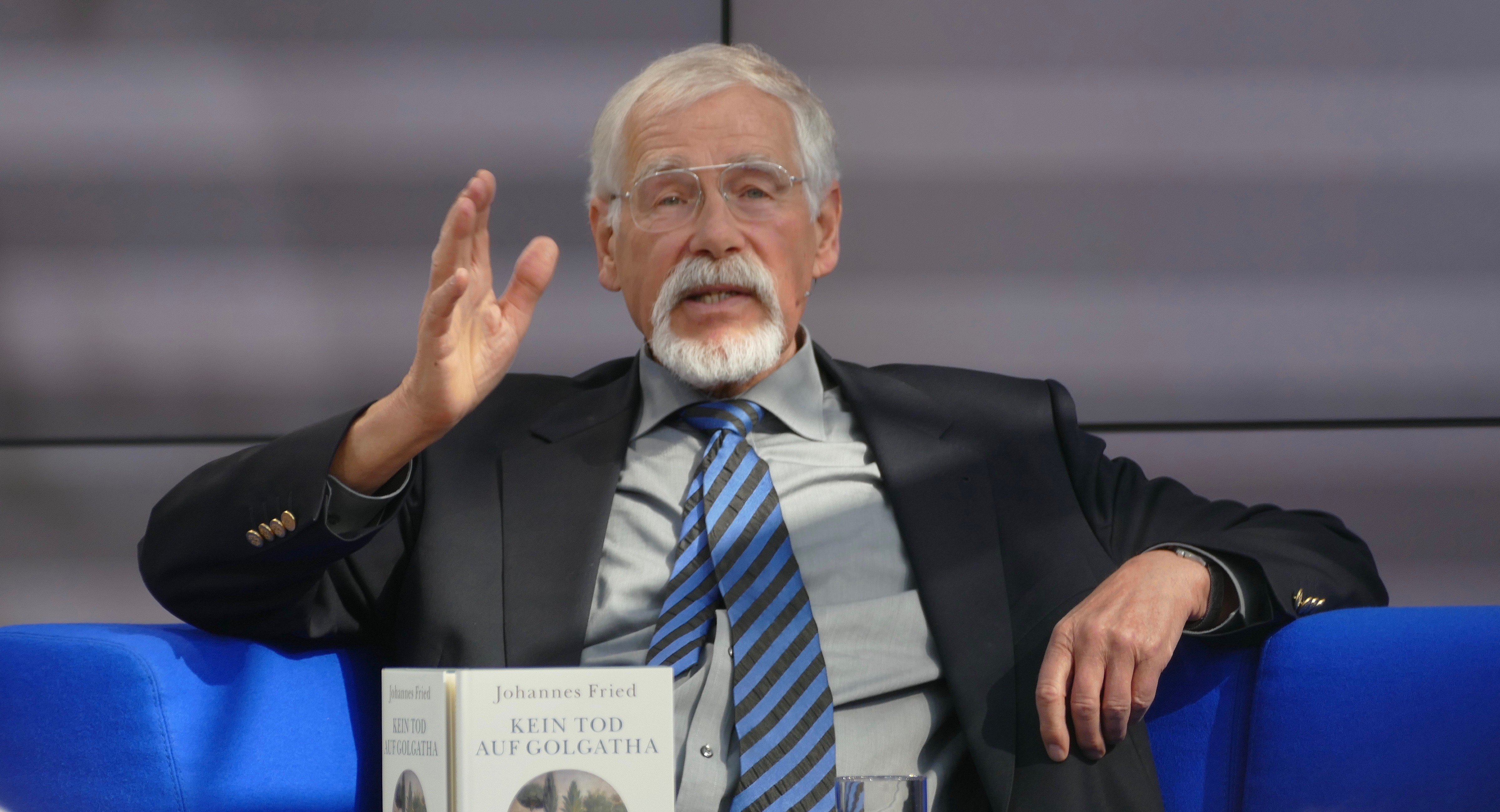 Johannes Fried stellt auf auf der Leipziger Buchmesse 2019 sein Sachbuch "Kein Tod auf Golgatha. Auf der Suche nach dem überlebenden Jesus" (C. H. Beck) vor.